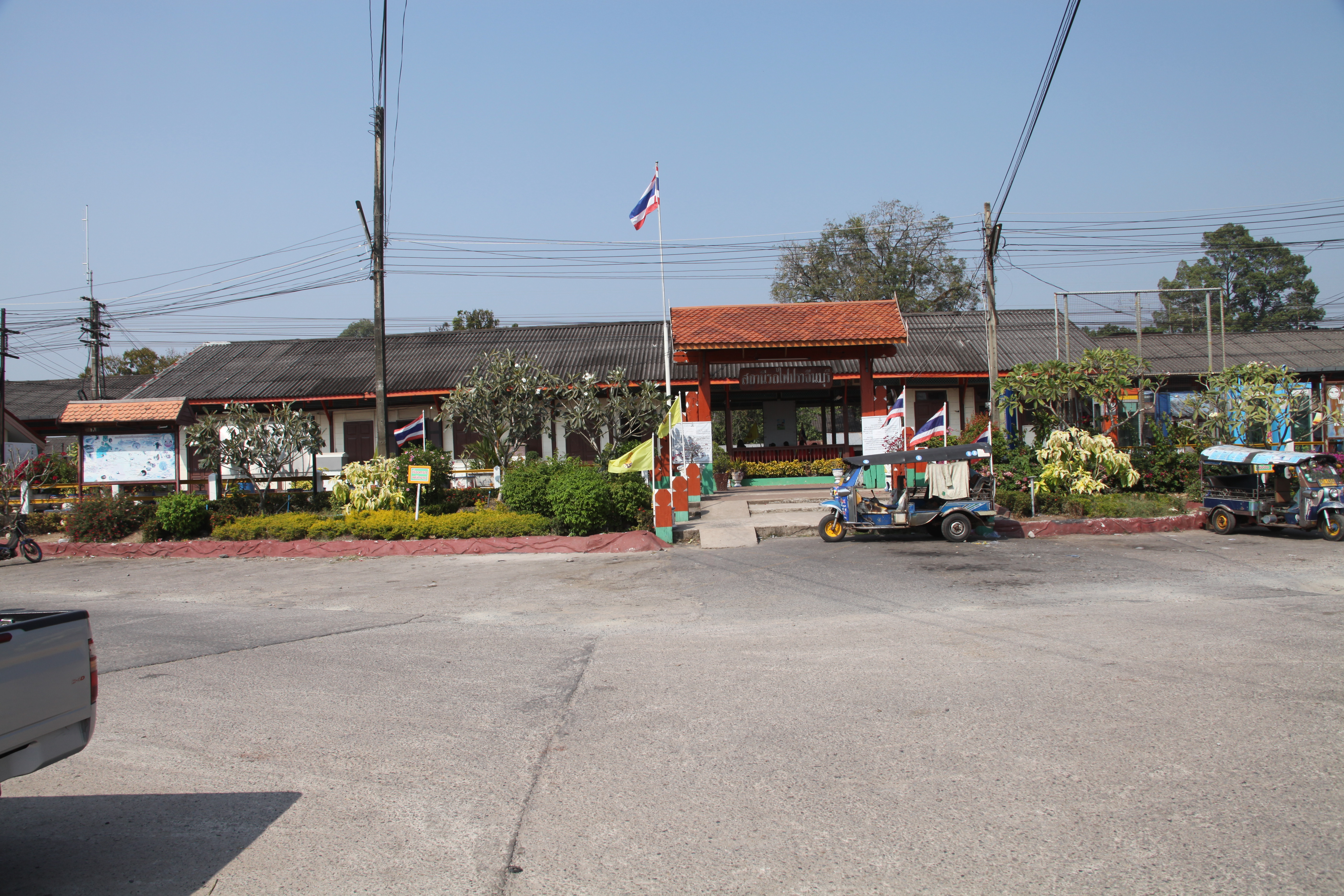 プラーチーンブリー駅